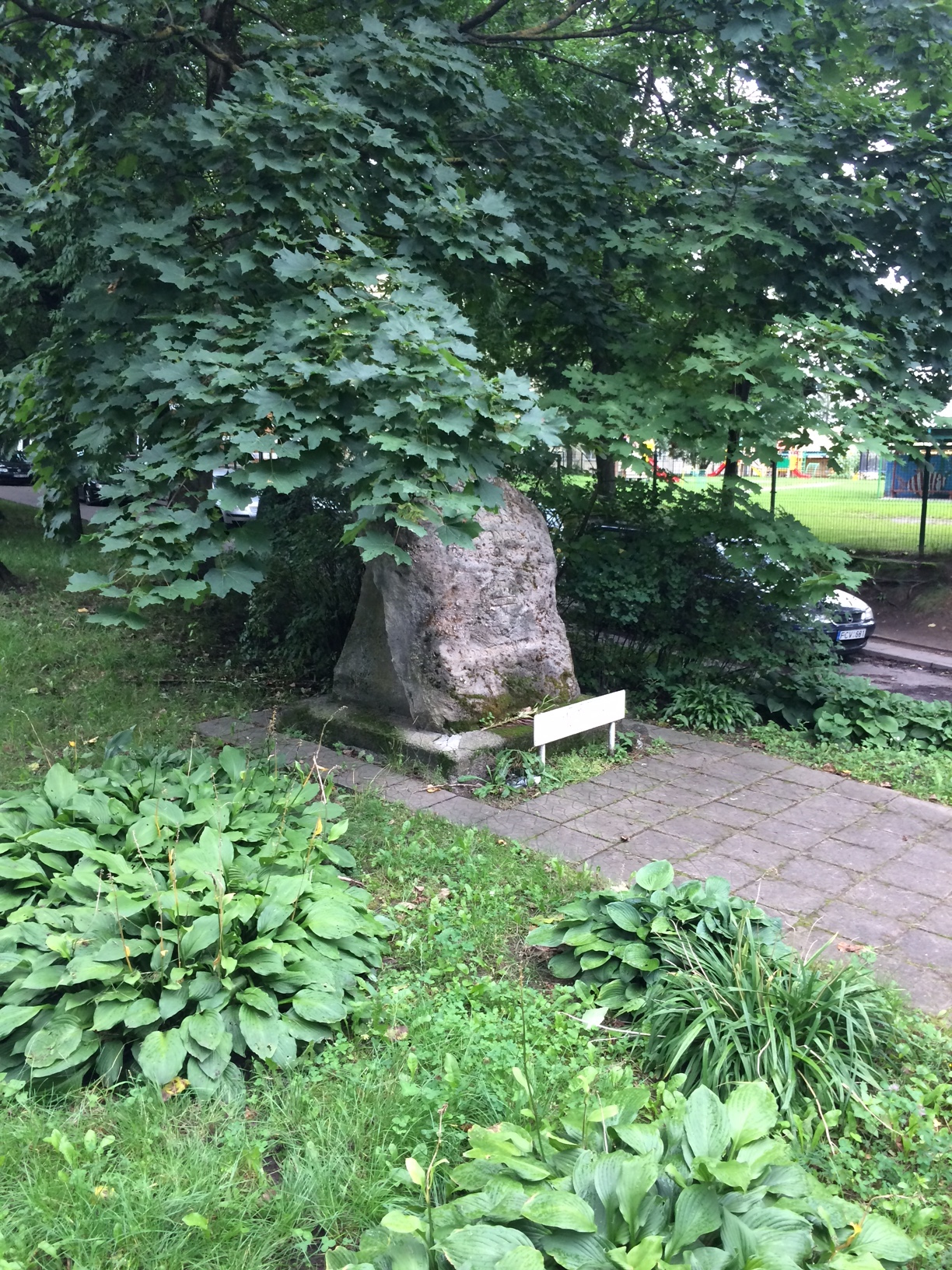 Simono Konarskio tikėtinoje žūties vietoje (Muitinės g. 35) pastatytas atminimo akmuo